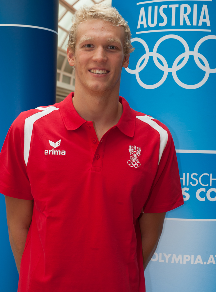 Einkleidung der Österreichischen Teilnehmer an den Olympischen Sommerspielen 2016 am 16./17. Juli 2016 in Wien. Bild zeigt Felix Auböck.